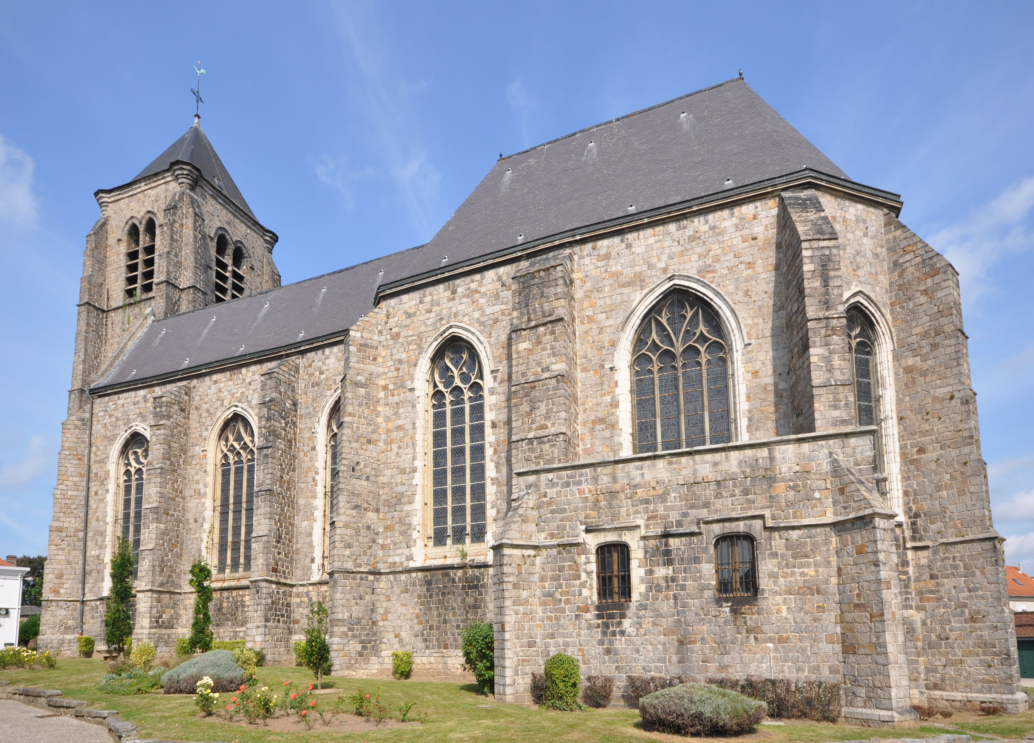 Église Saint-Martin de Beuvry, (Classé, 1920) .